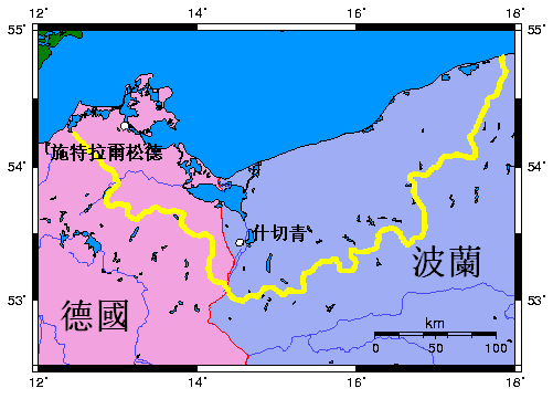 波美拉尼亚的地图。我把原作者加入的地名翻译了。原图在[1]。